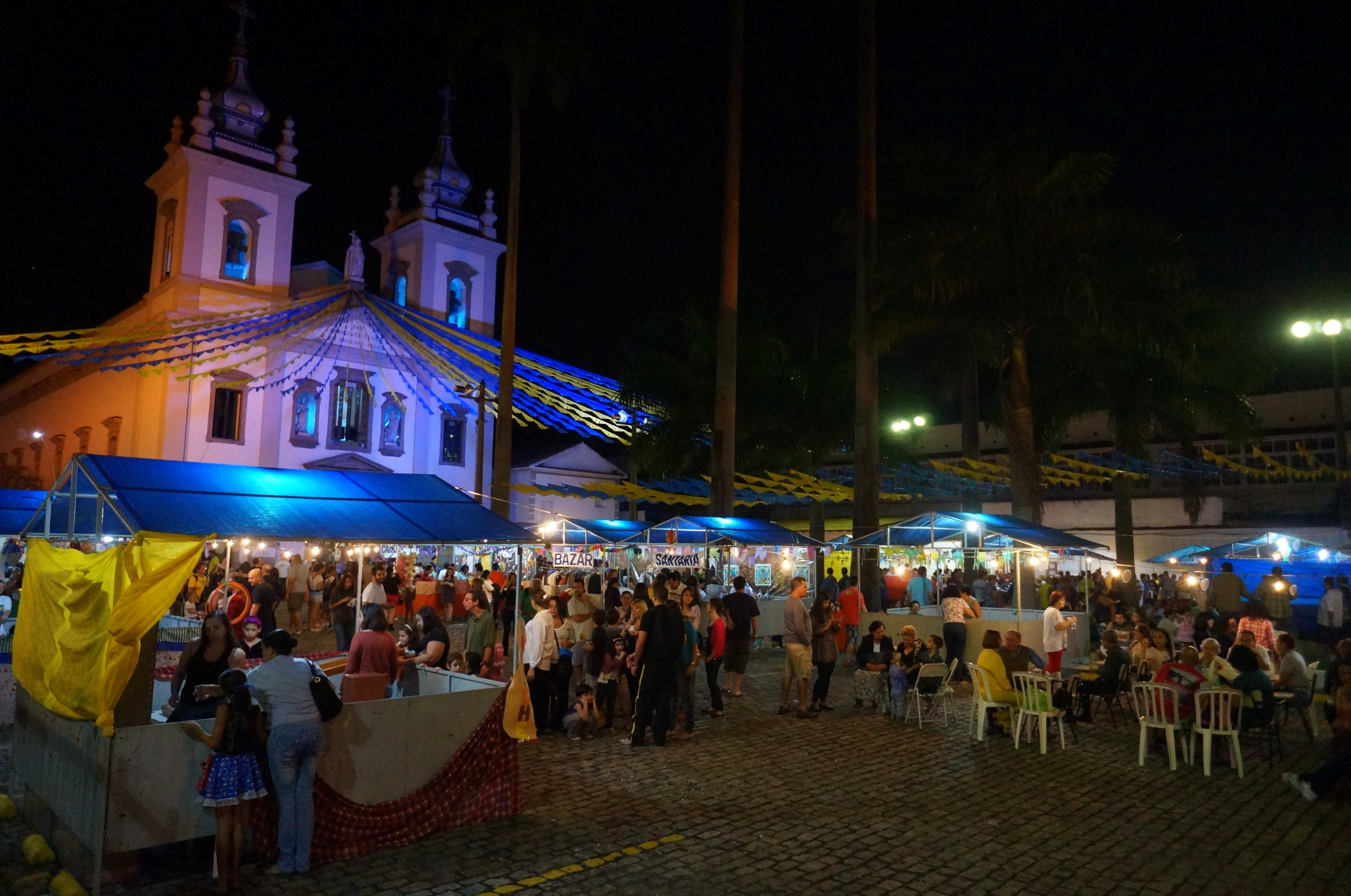 Paróquia de São Francisco Xavier do Engenho Velho, Rio de Janeiro.